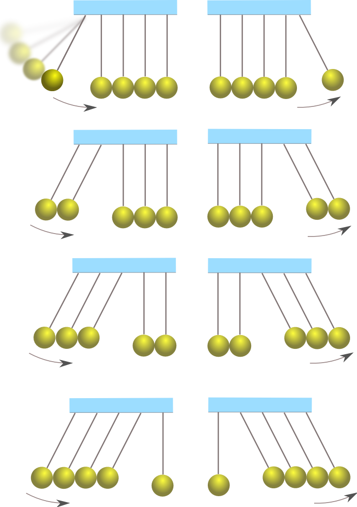 Kugelstoßpendel